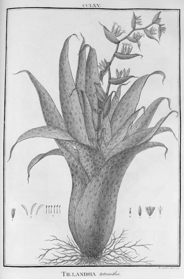 Tillandsia tetrantha Ruiz & Pav.